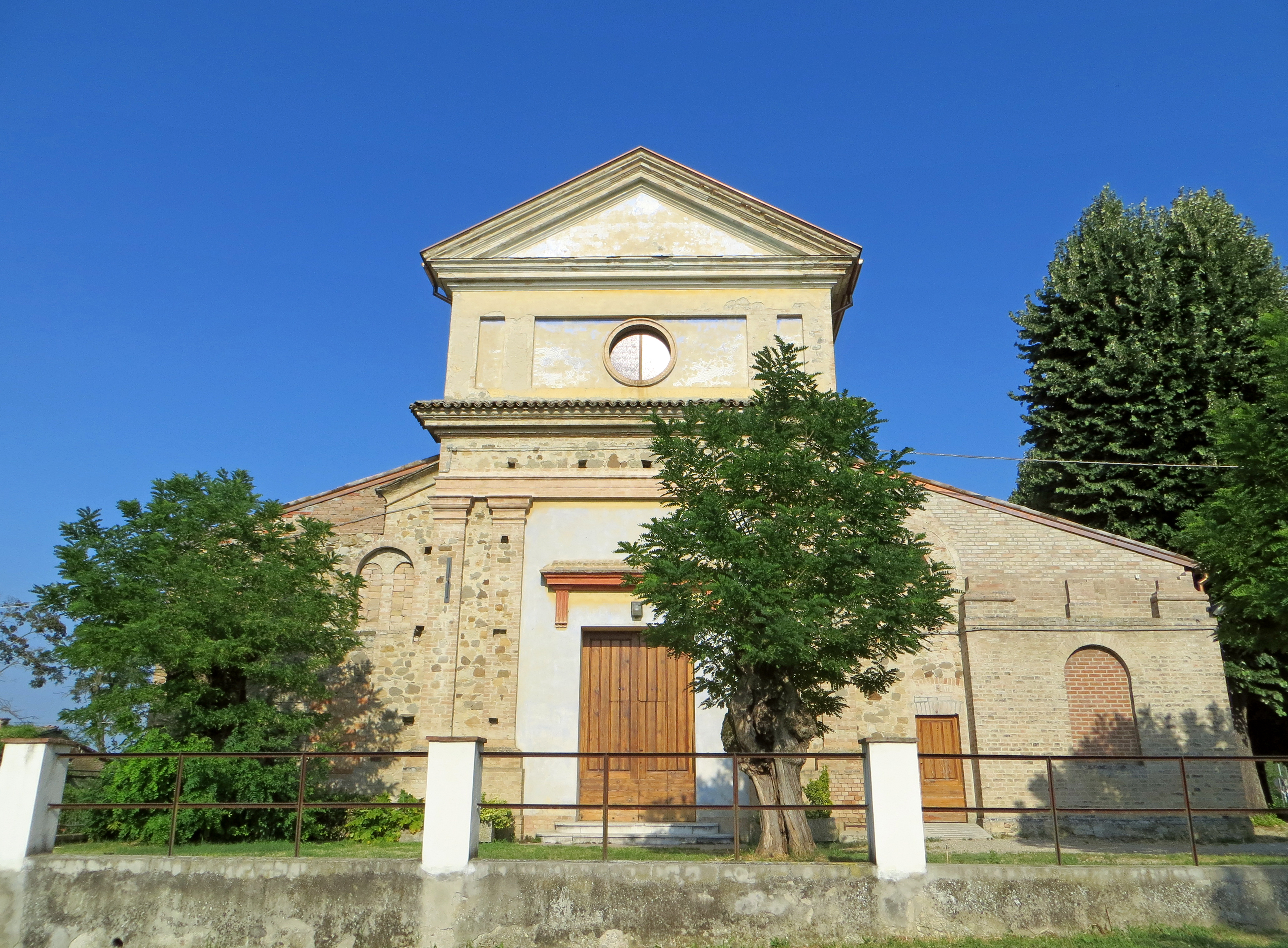 Chiesa della Purificazione di Maria Vergine (Santa Maria del Piano, Lesignano de' Bagni) - facciata